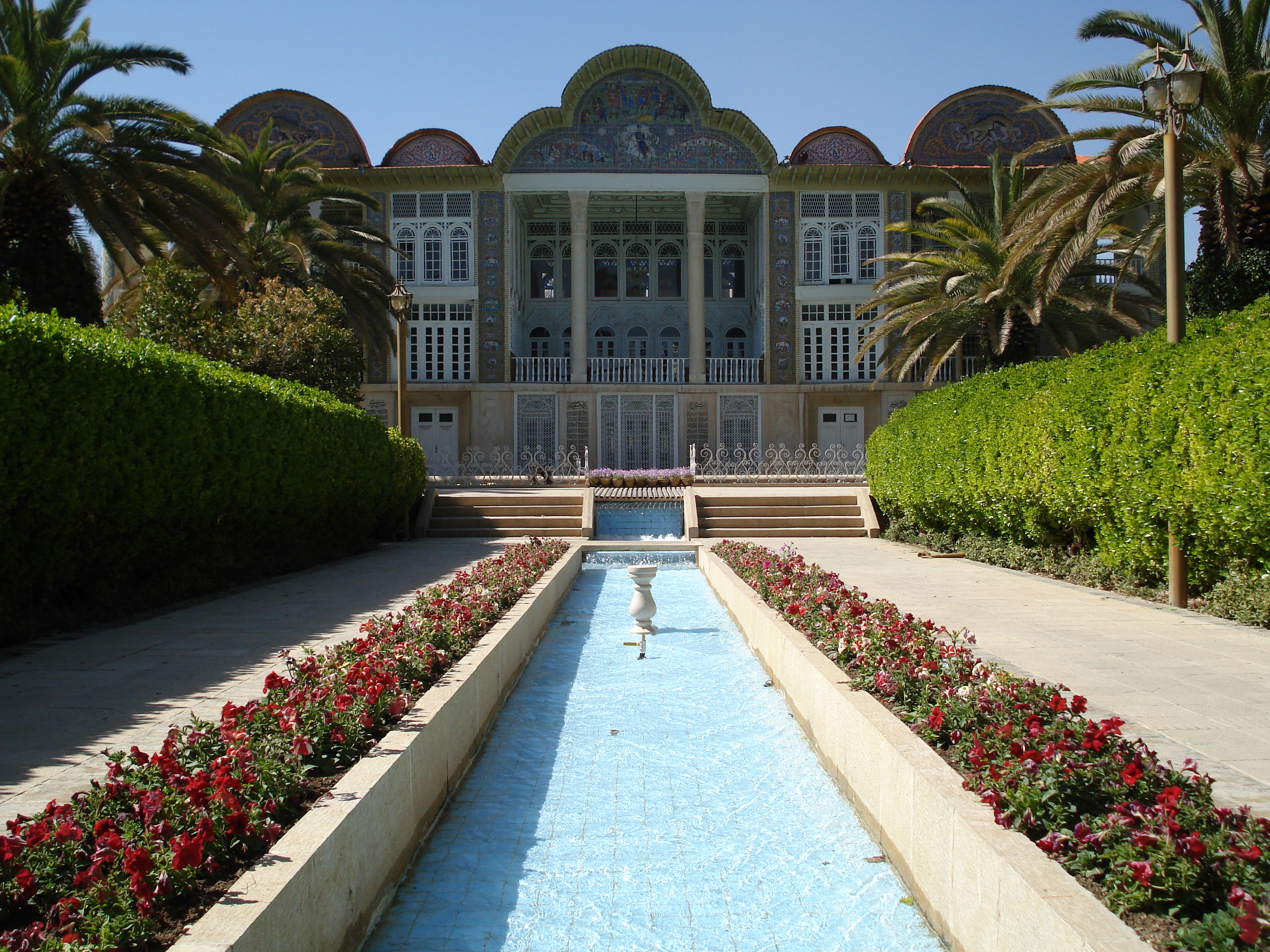 Eram Garten in Shiraz